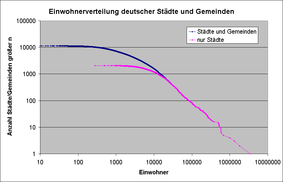 genauere Ausarbeitung von File:Powercitieslnrp.png